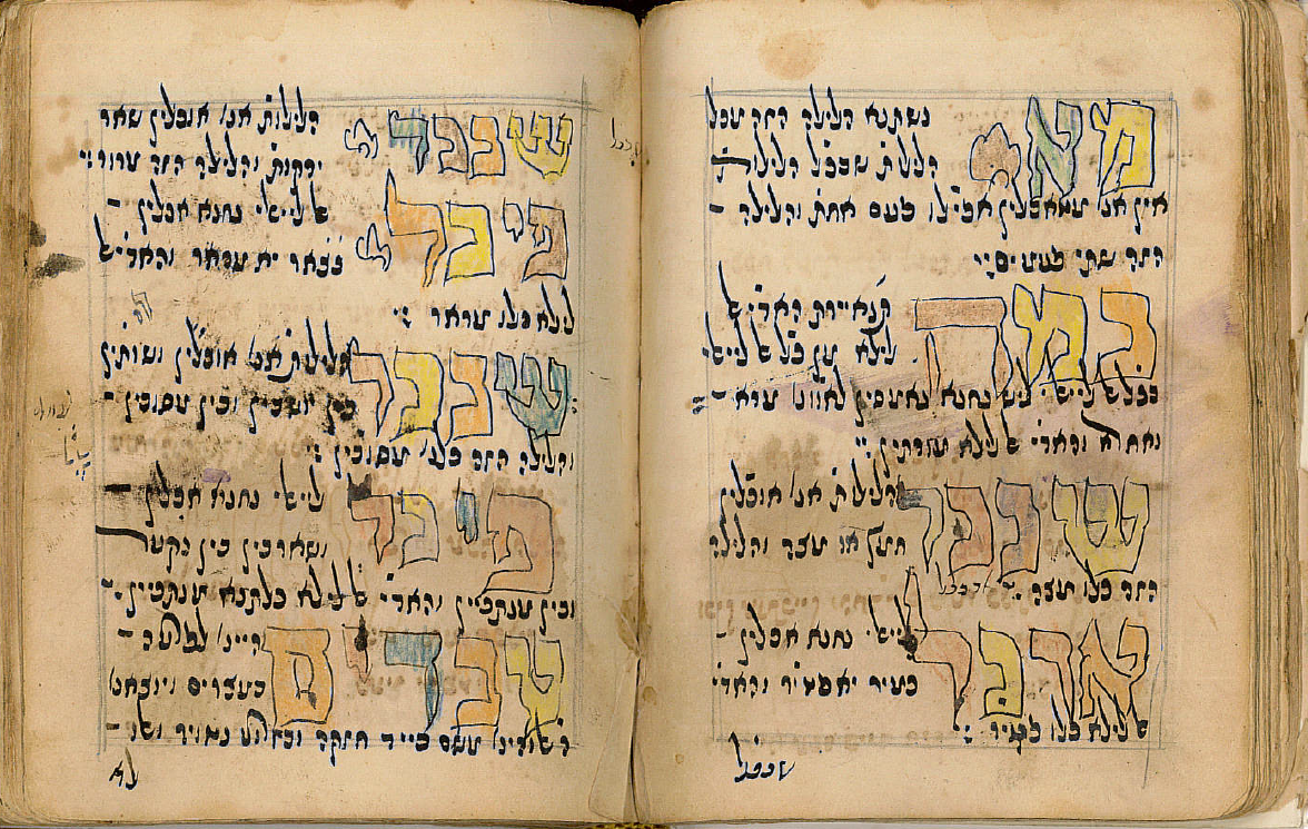 קטע מתוך הגדה של פסח שנכתבה בערך בשנות ה-20 של המאה ה-20 ע"י הרב עזרא אליאס בבגדאד בכתב הייחודי של יהודי עיראק.